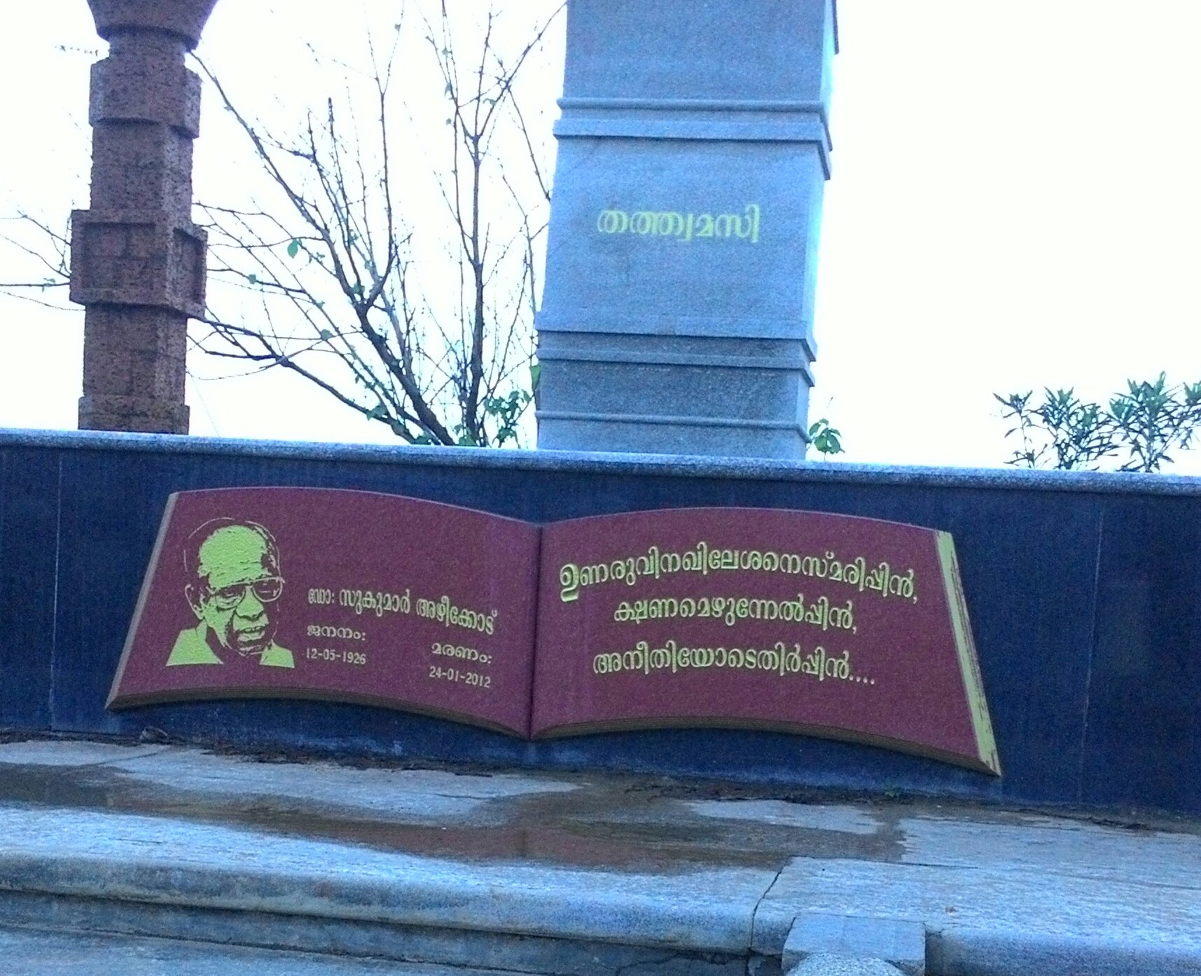 സുകുമാർ അഴീക്കോട് സ്മാരകം, കണ്ണൂർ പയ്യാമ്പലം